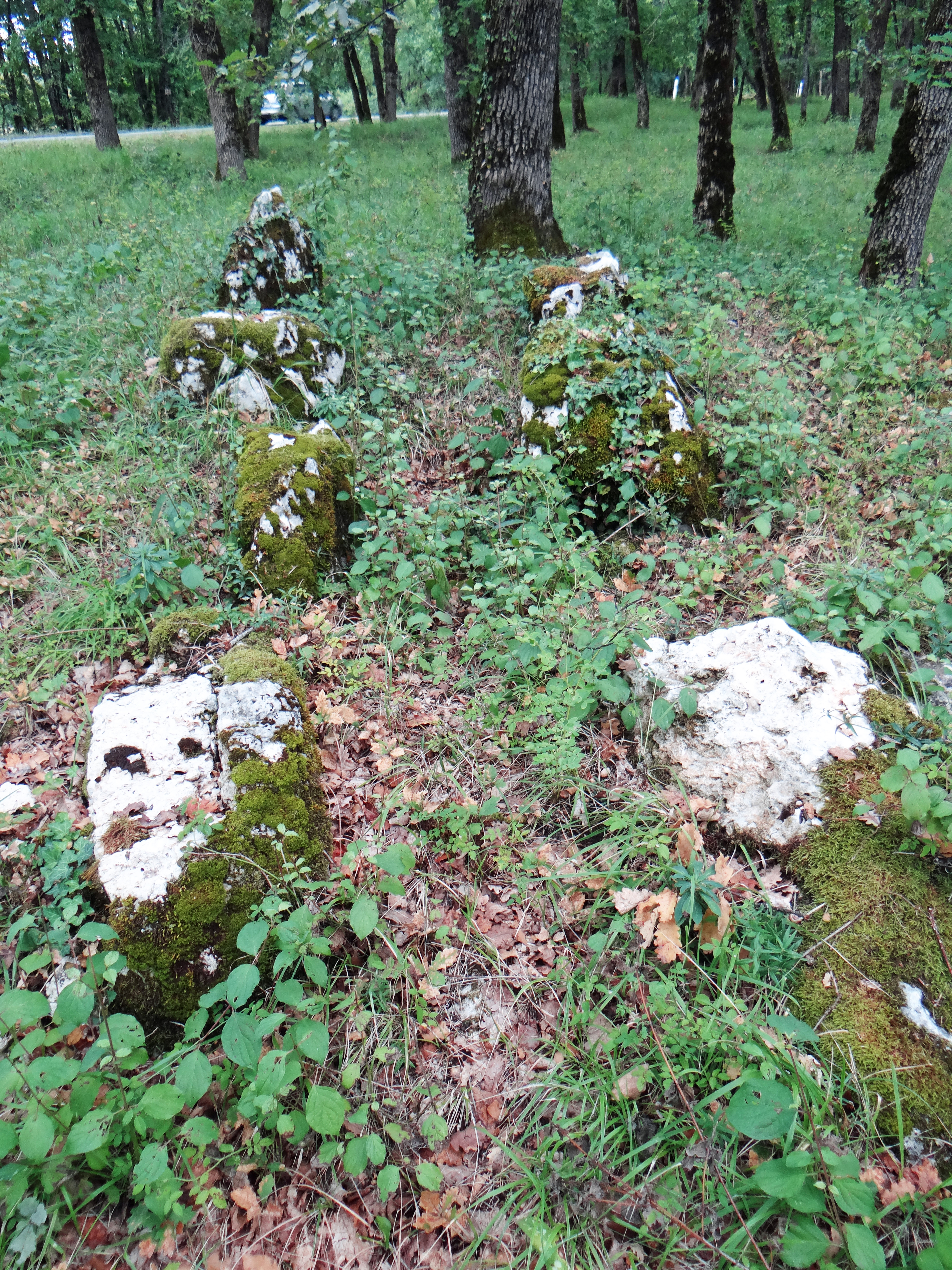 Tournon-d'Agenais - Un des alignements près du château du Bosc (Masquières), appelé "Tombeau des Géants"